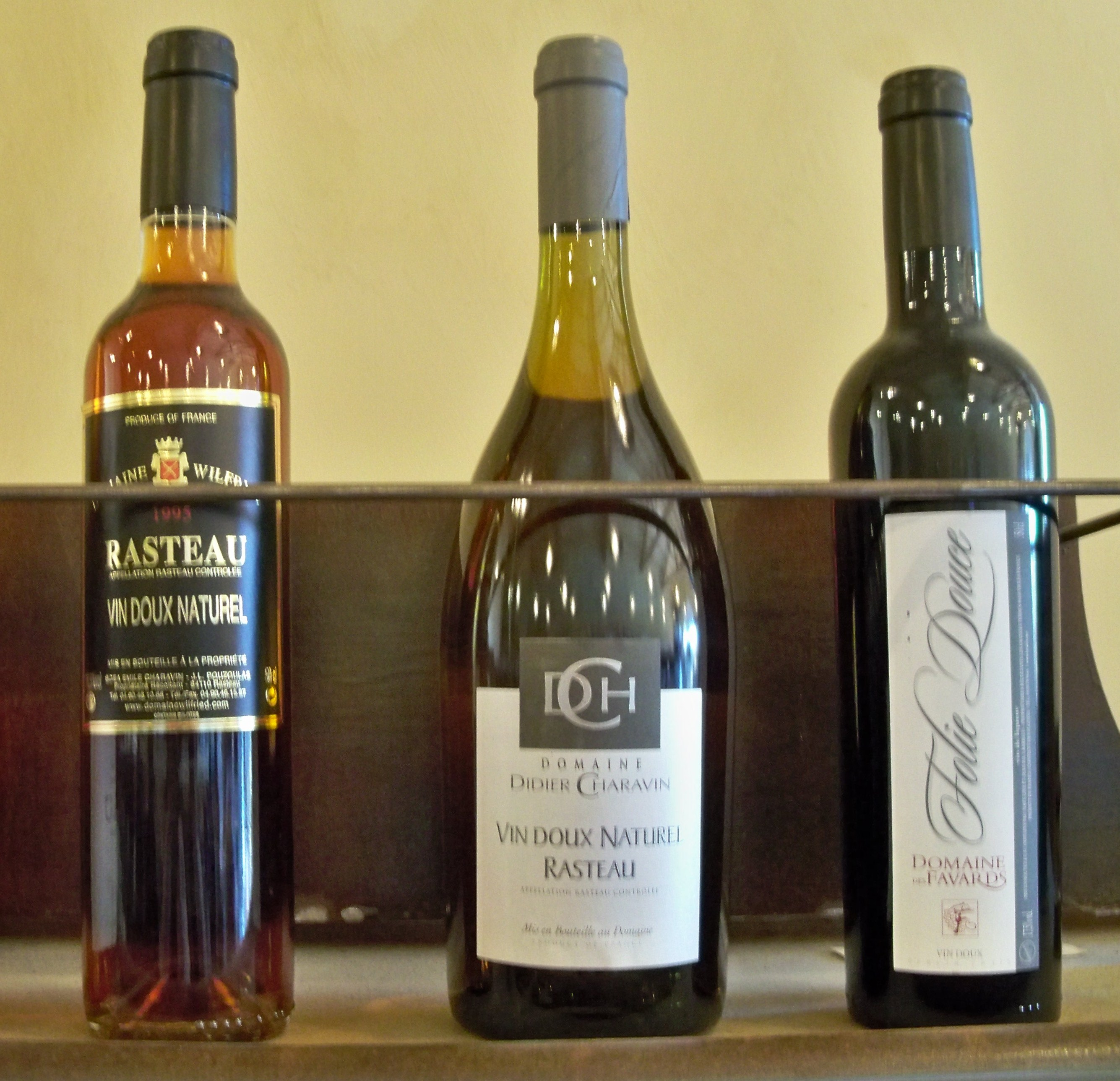 Vins doux naturel de Rasteau